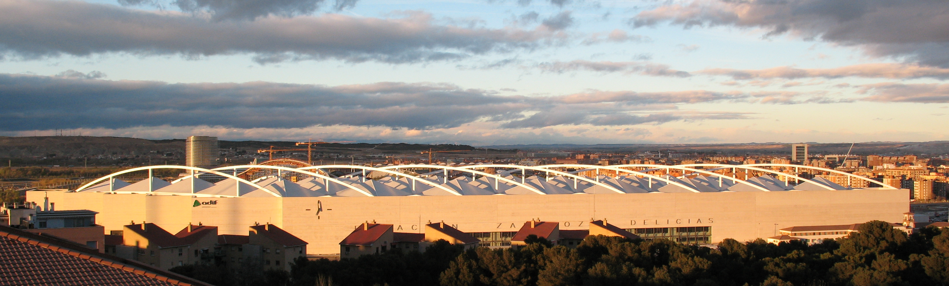 Estación Zaragoza Delicias (Zaragoza, España). Detrás, a la izquierda, puede observarse la Torre del Agua de Expo Zaragoza 2008 y el resto de edificios del recinto, en obras, junto al Puente del Tercer Milenio. A la derecha, las torres del World Trade Center Zaragoza. Delante, a la derecha, la antigua estación de Las Delicias y el parque Castillo Palomar.